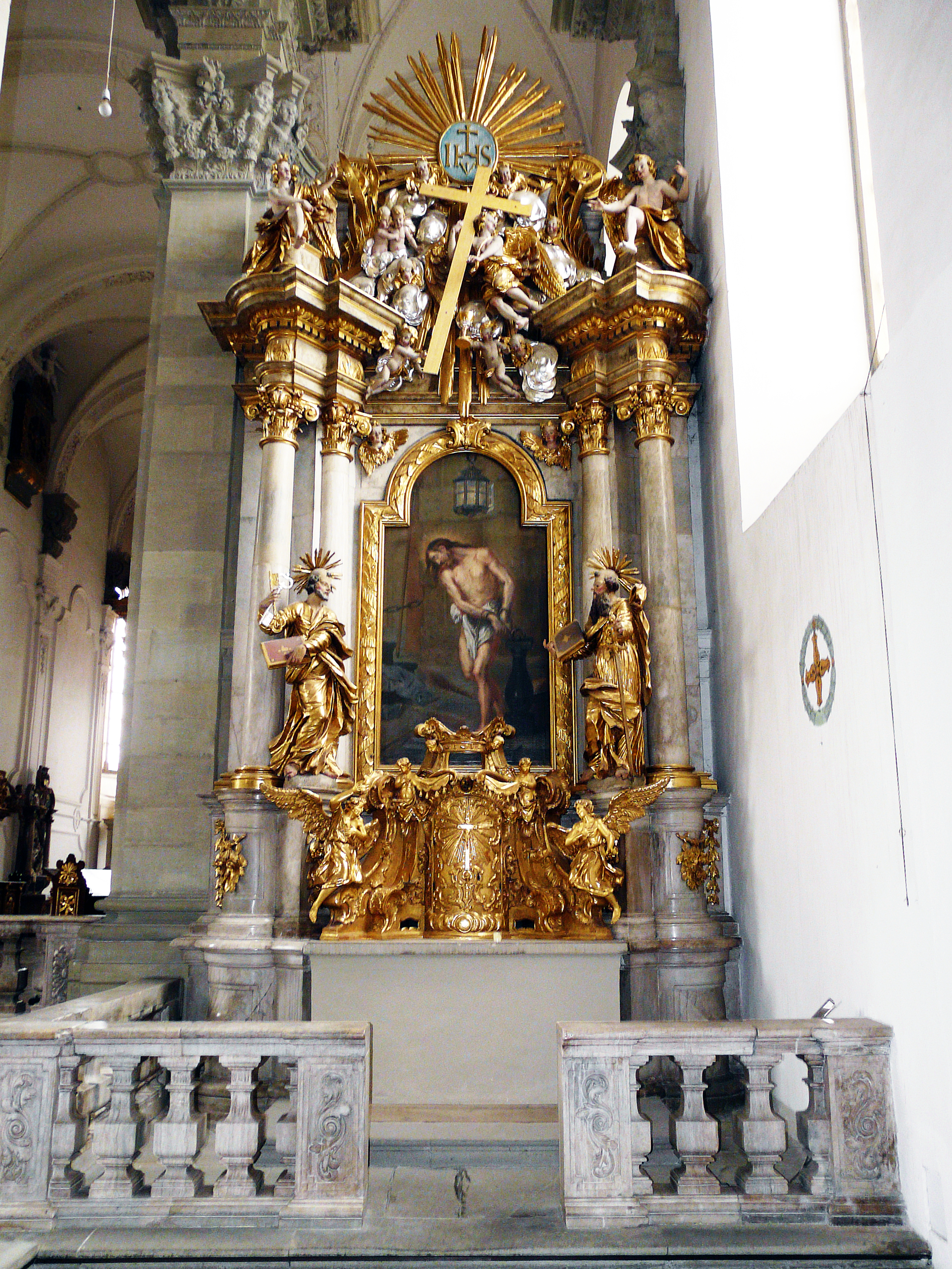 Южный алтарь